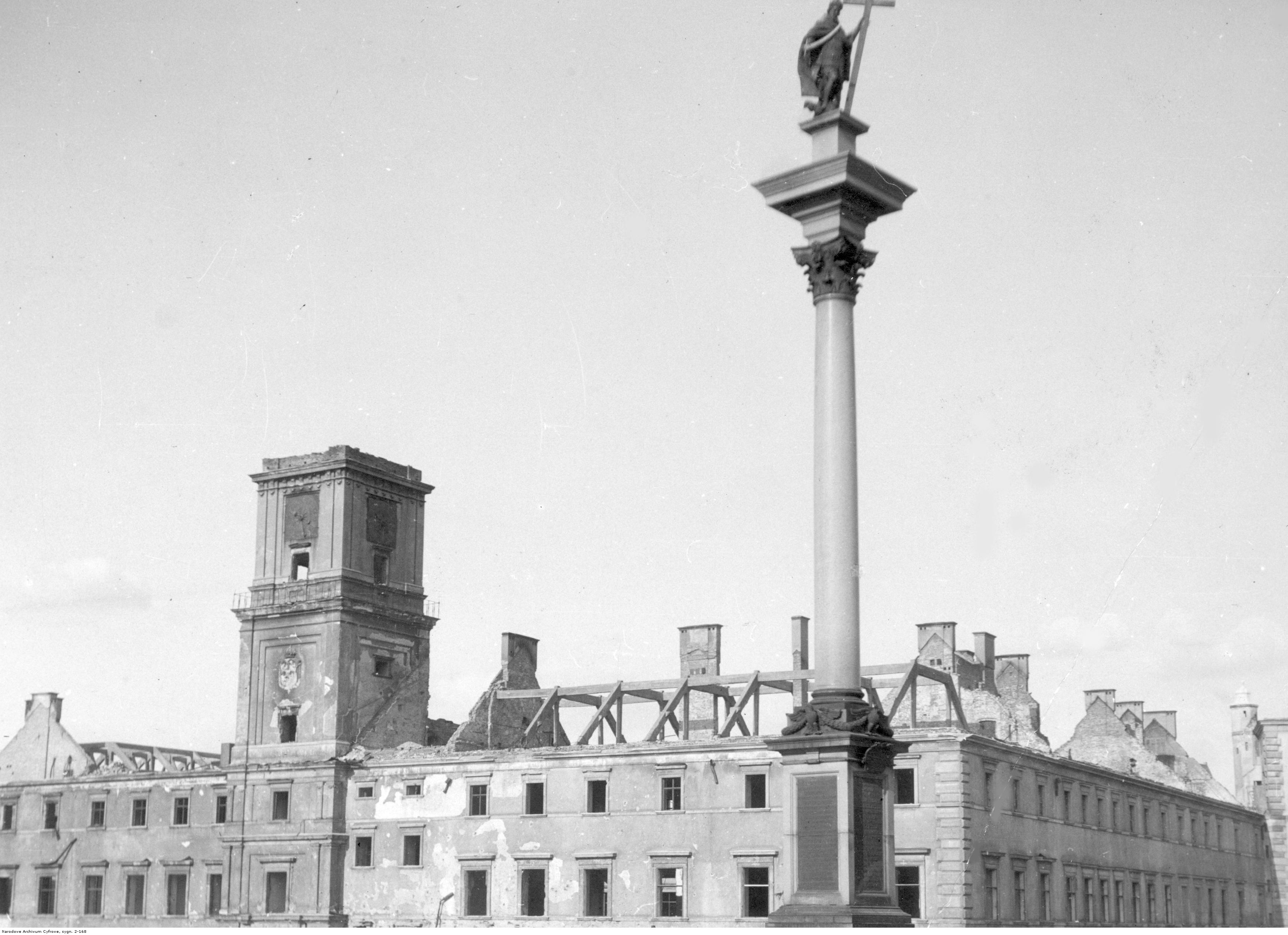 Zniszczony Zamek Królewski, widoczna także Kolumna Zygmunta na Placu Zamkowym.